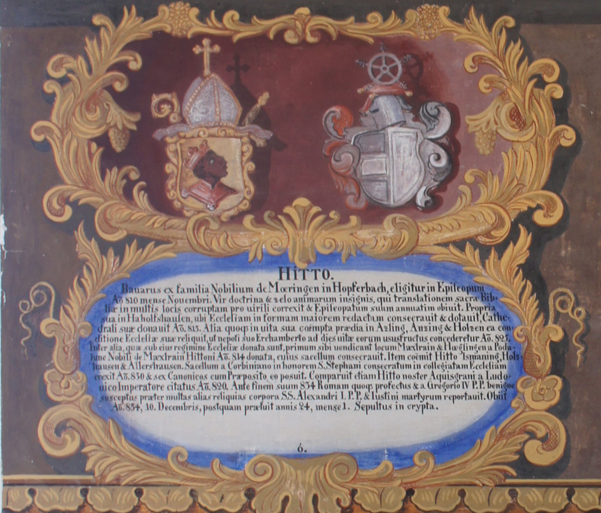 Wappentafel von Hitto, Bischof von Freising, im Fürstengang zwischen Fürstbischöflicher Residenz und Freisinger Dom. Links das geistliche, rechts das persönliche Wappen, darunter ein lateinischer Text mit kurzer Biographie.